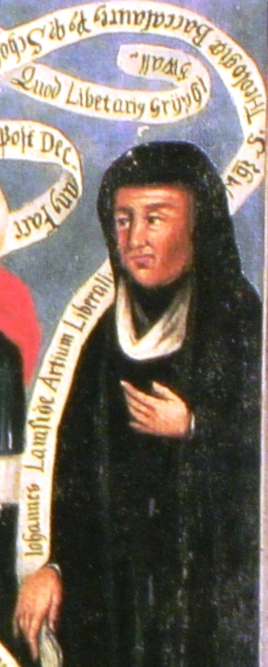 Bild Johannes Lamside. Ausschnitt aus der Rubenow-Tafel in Greifswald.